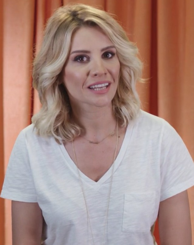 Esra Erol'un oynadığı TOFD | Bir Telefonunuza Bakar Tanıtımından bir kare